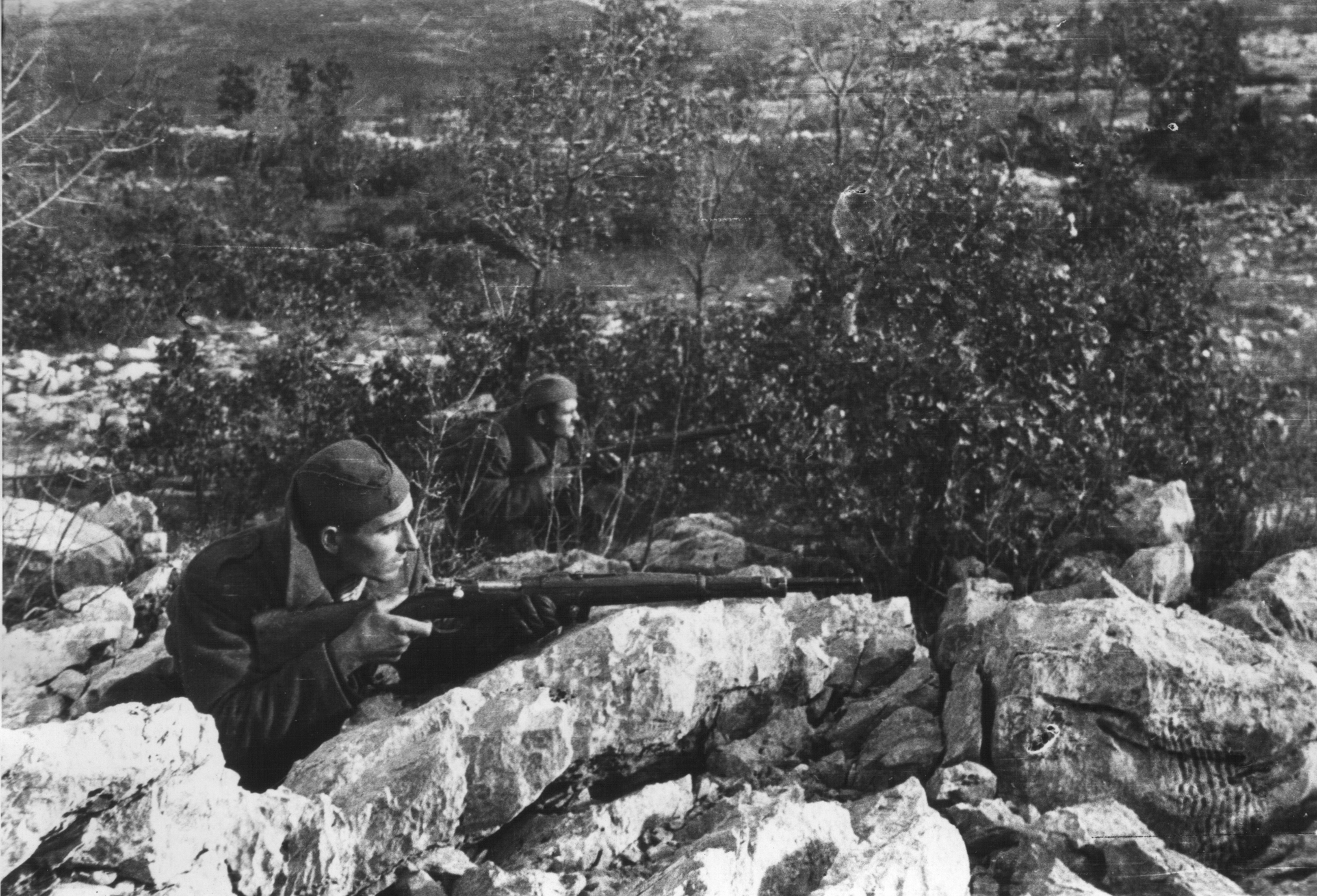 Boji za osvoboditev Slovenskega primorja in Trsta.